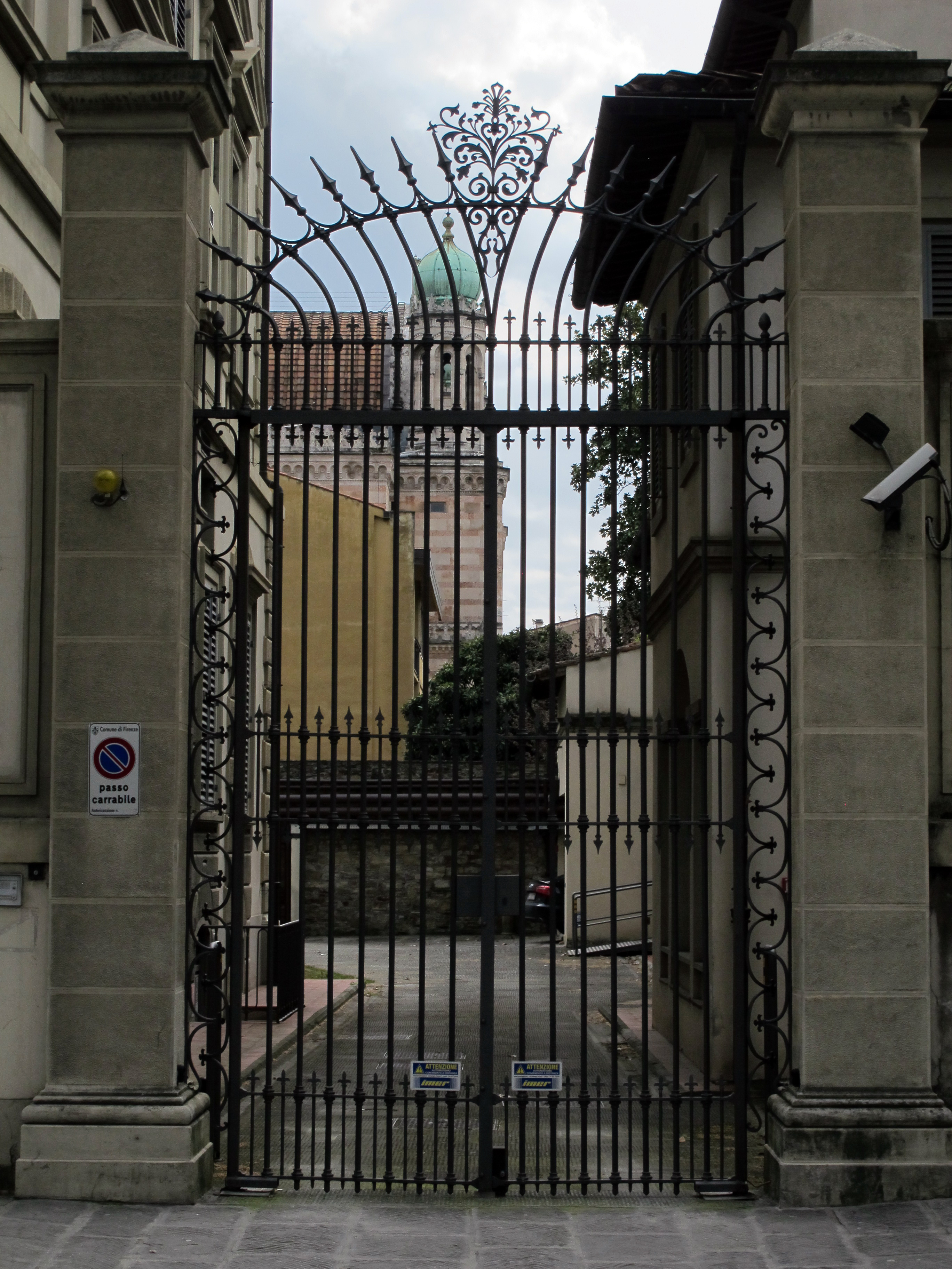 Piazza d'azeglio 25-26, palazzina d'ancona 03 cancello